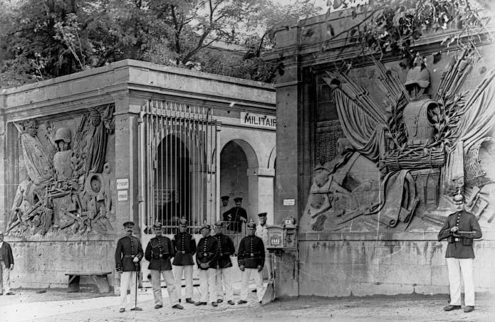 Caserne de Metz, ancienne caserne du génie français avant 1870 (avec des soldats allemands devant la caserne) : photographie de presse